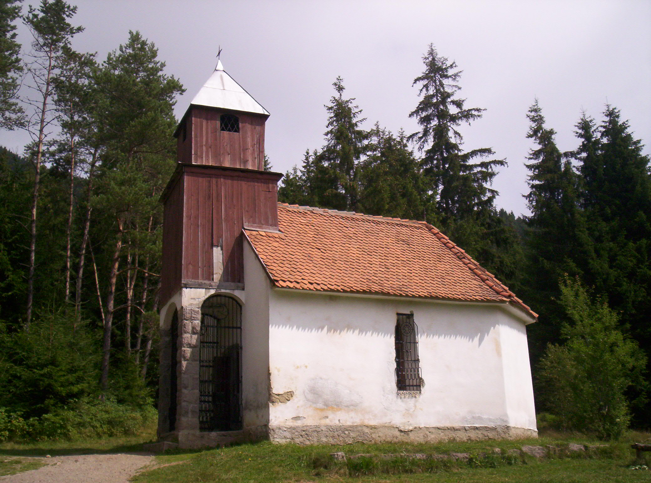 A Szent Anna-kápolna az erdélyi Szent Anna-tó mellett – photo taken by uploader User:Csanády in 2006.